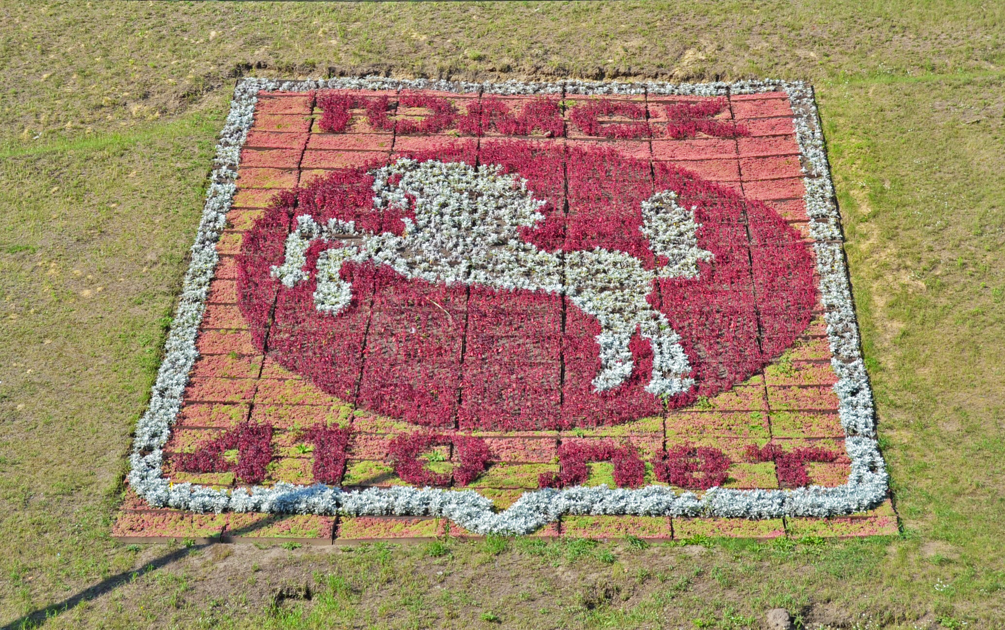 Цветочная посадка на въезде в Томск по ул.Нахимова